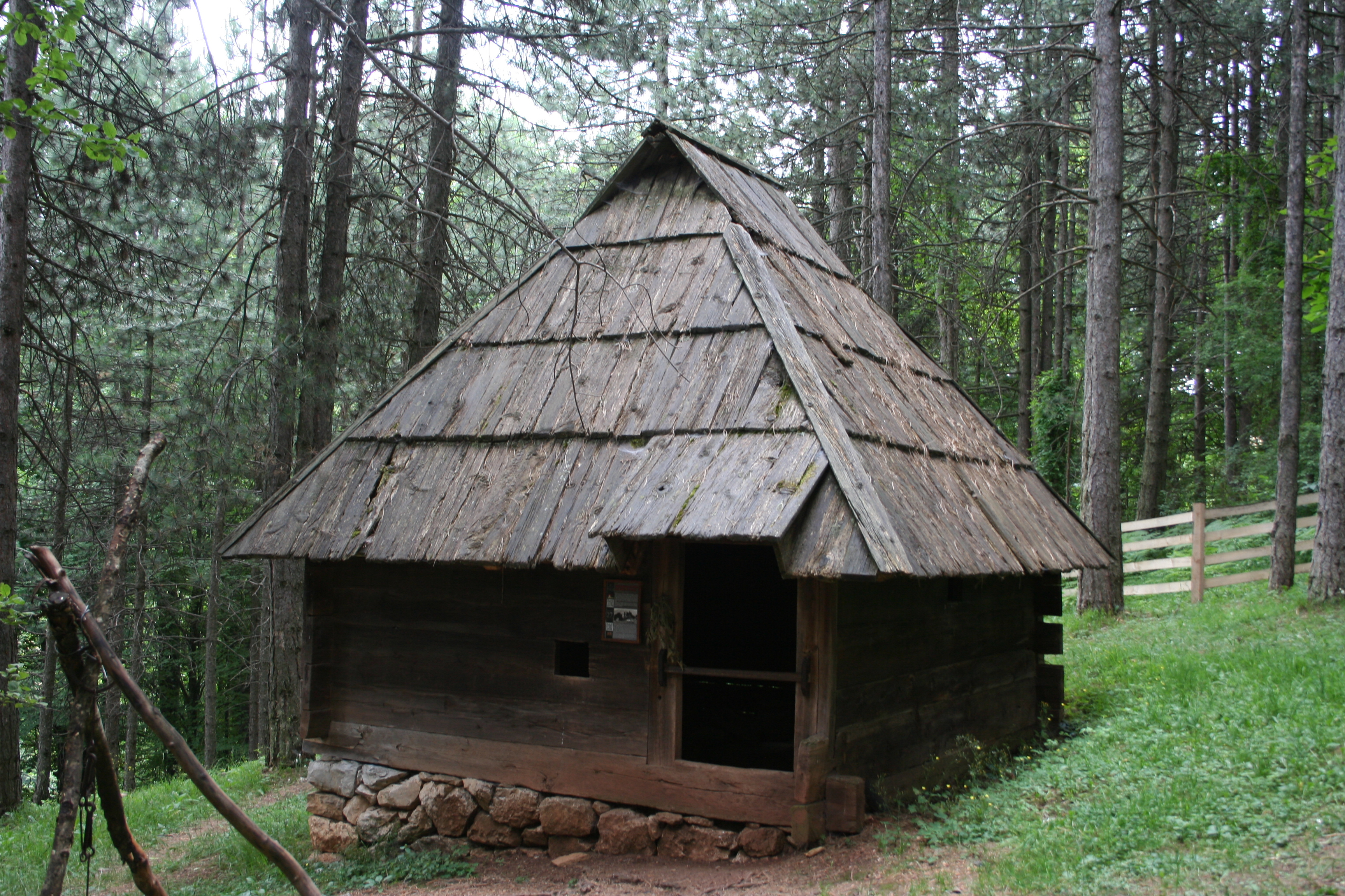 Muzej "Staro selo" Sirogojno